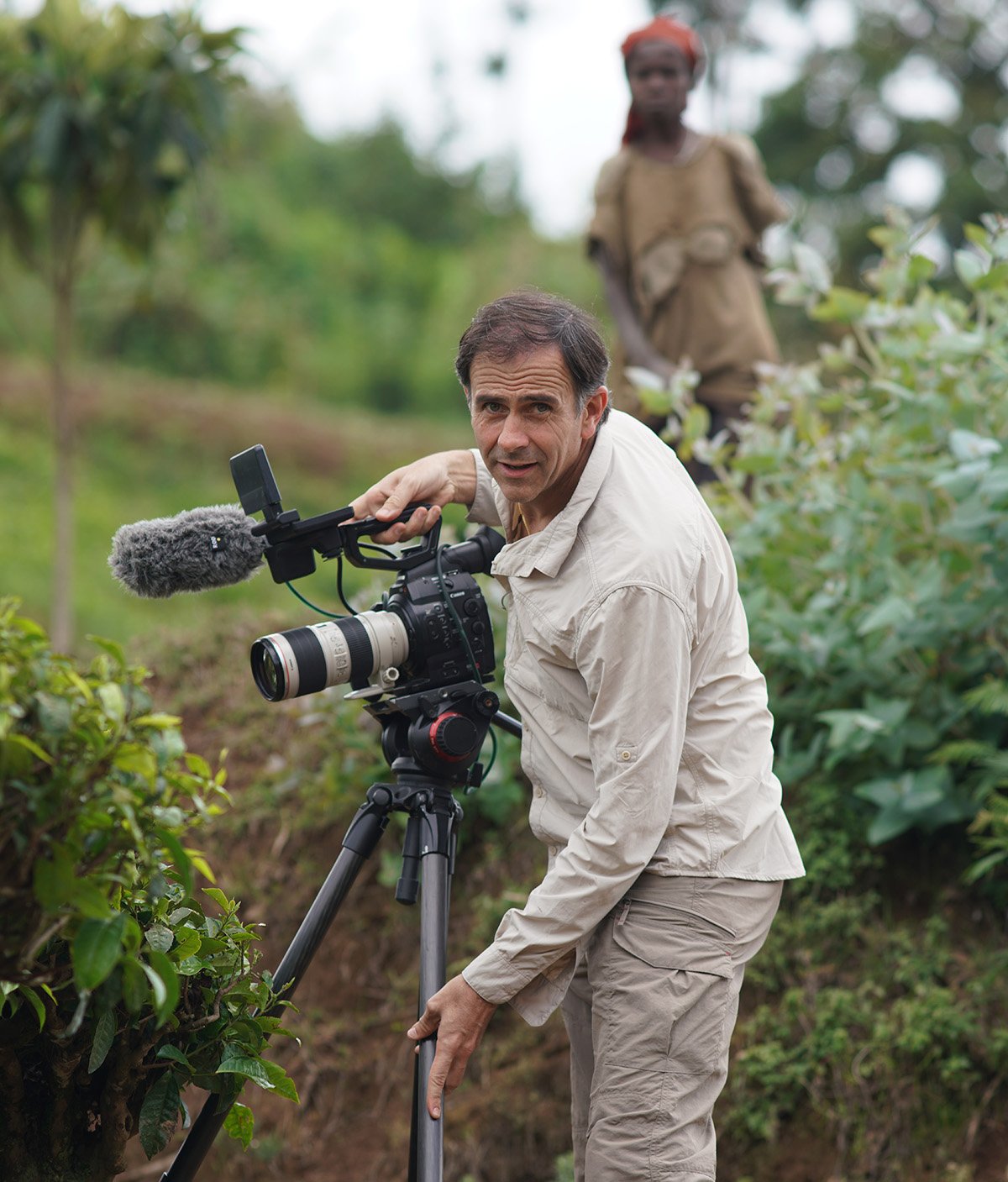 Juan Manuel Cotelo, durante el rodaje de su película "EL MAYOR REGALO", en Ruanda.